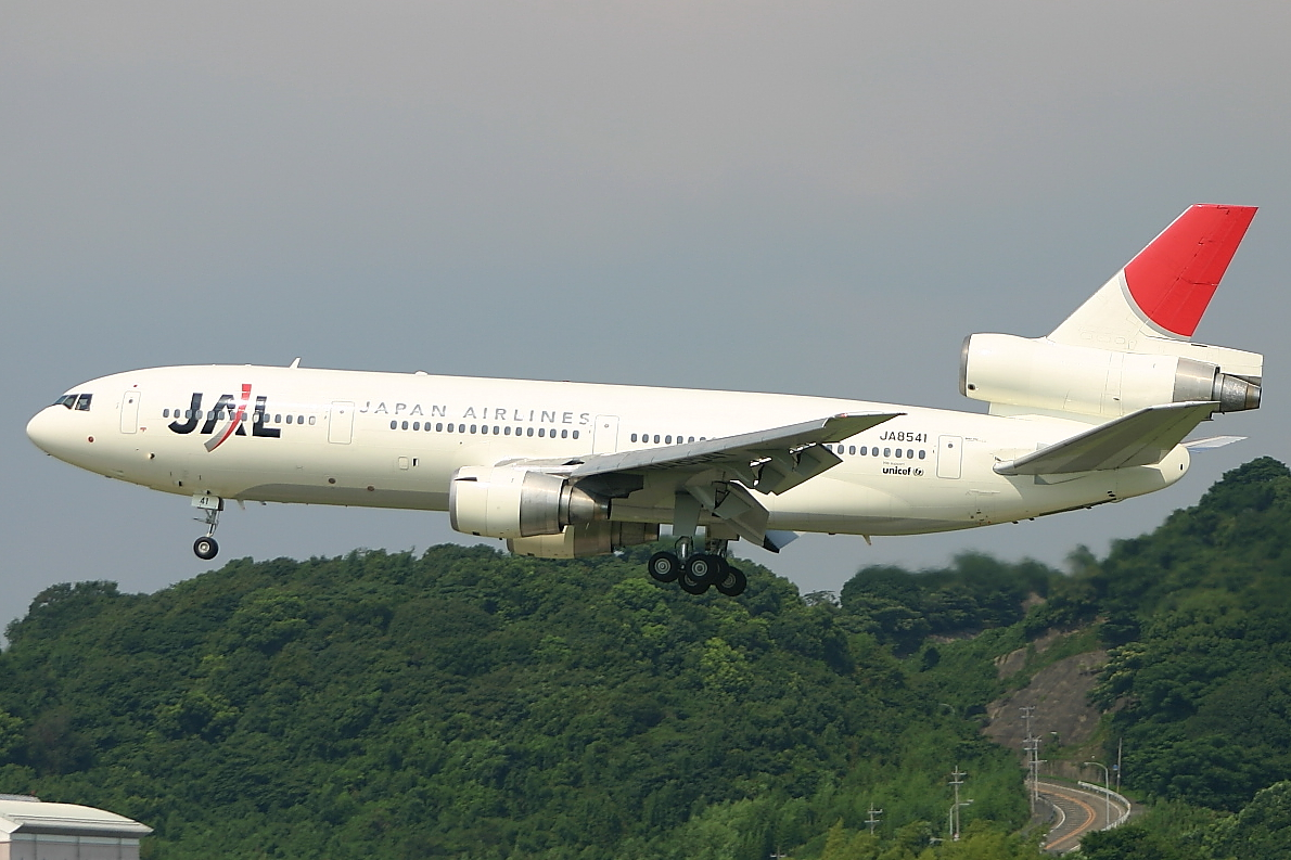 日本航空 マクドネル・ダグラス DC-10-40I JA8541 福岡空港